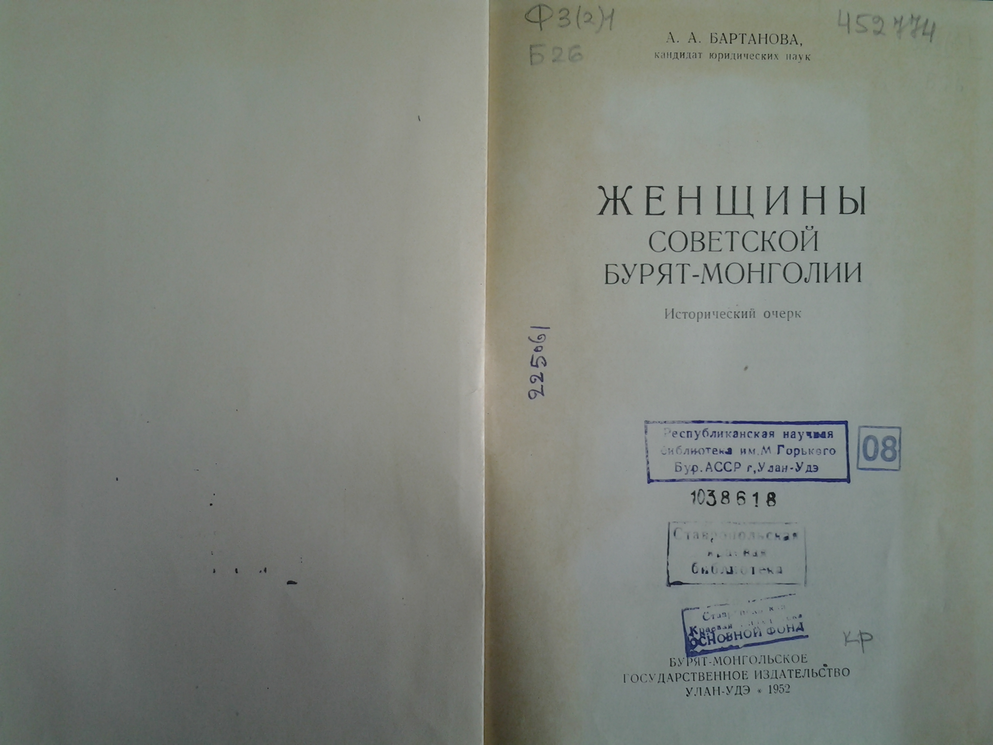 Женщины советской Бурят-Монголии